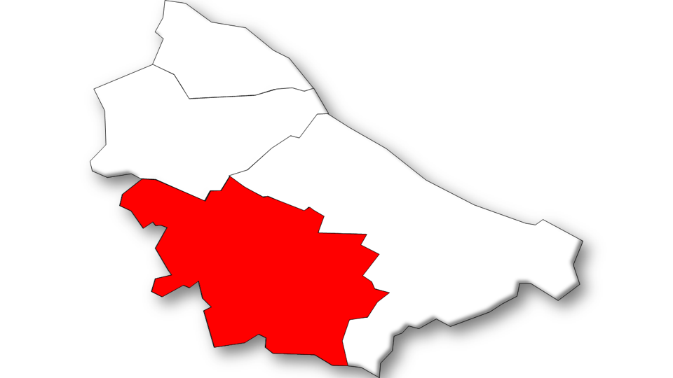 Evolução da População